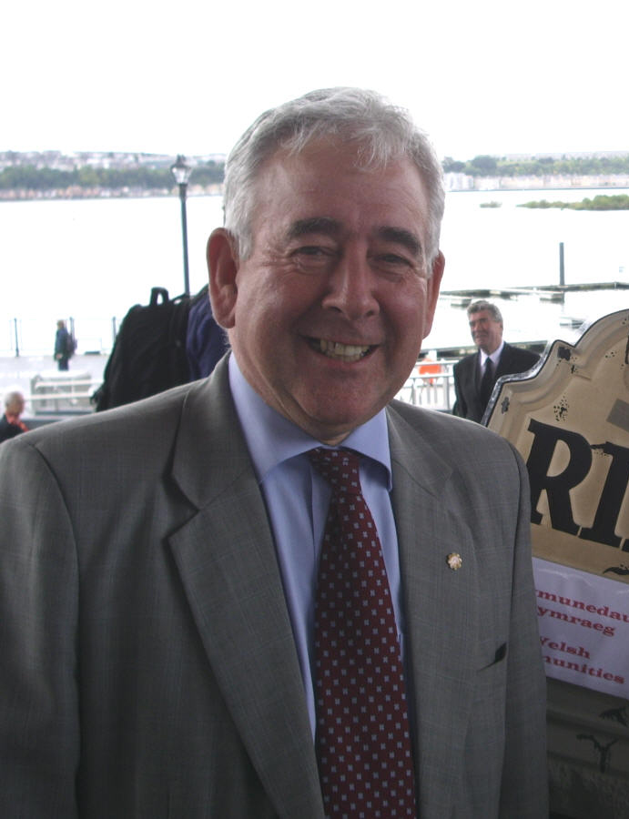 Dafydd Wigley, a Welsh politician.